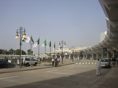 Nouveau terminal de Aéroport d'Alger - Houari Boumédiène